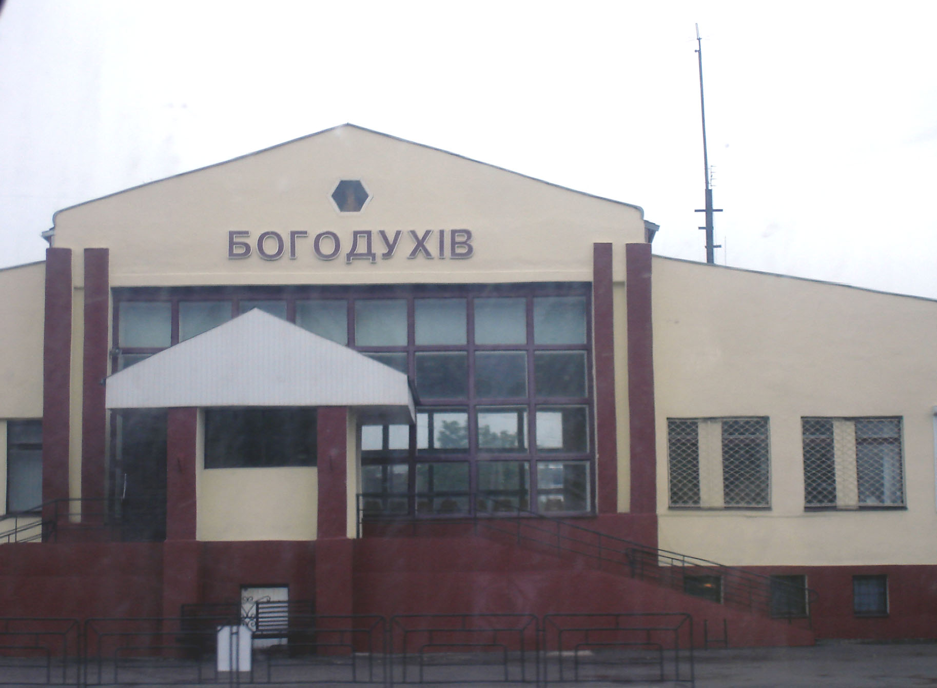 Залізнична станція Богодухів. Вокзальна будівля. Фото з вікна потягу.